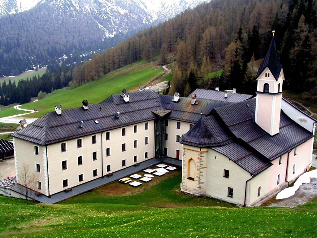 Maria Waldrast, Österreich, 2006